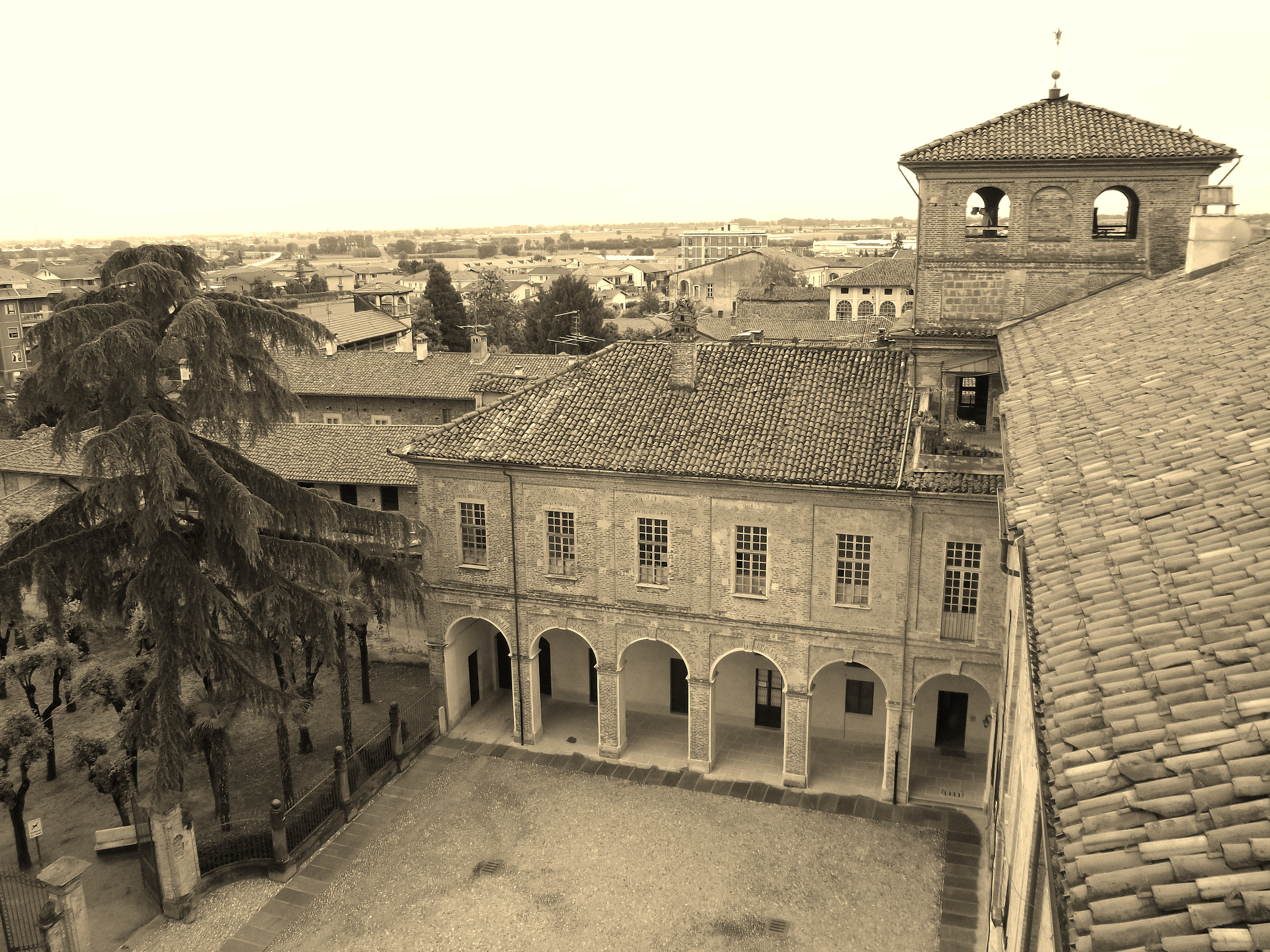 Piemontèis: Palas del cumun 'd Costiòle